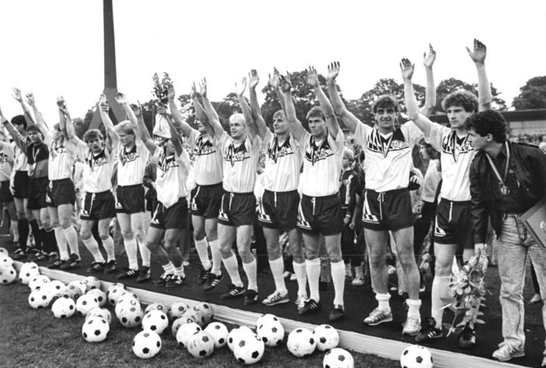 ADN-ZB-Häßler-3.6.89-ba-Dresden: Fußball-Oberliga. Schon vor Wochen hatte SG Dynamo Dresden zur Meisterfeier gerüstet - am letzten Spieltag, nach dem 5:0 Sieg über den 1. FC Union Berlin, fand sie statt. Die Mannschaft bedankte sich bei ihrem begeisterungsfähigen Publikum. Zum Saisonausklang waren 27000 Zuschauer gekommen.